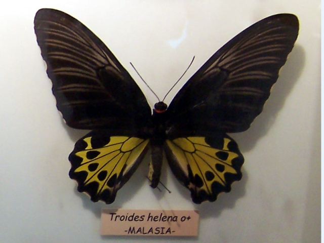 Mariposa alas de pájaro Troides helena (Troides helena)